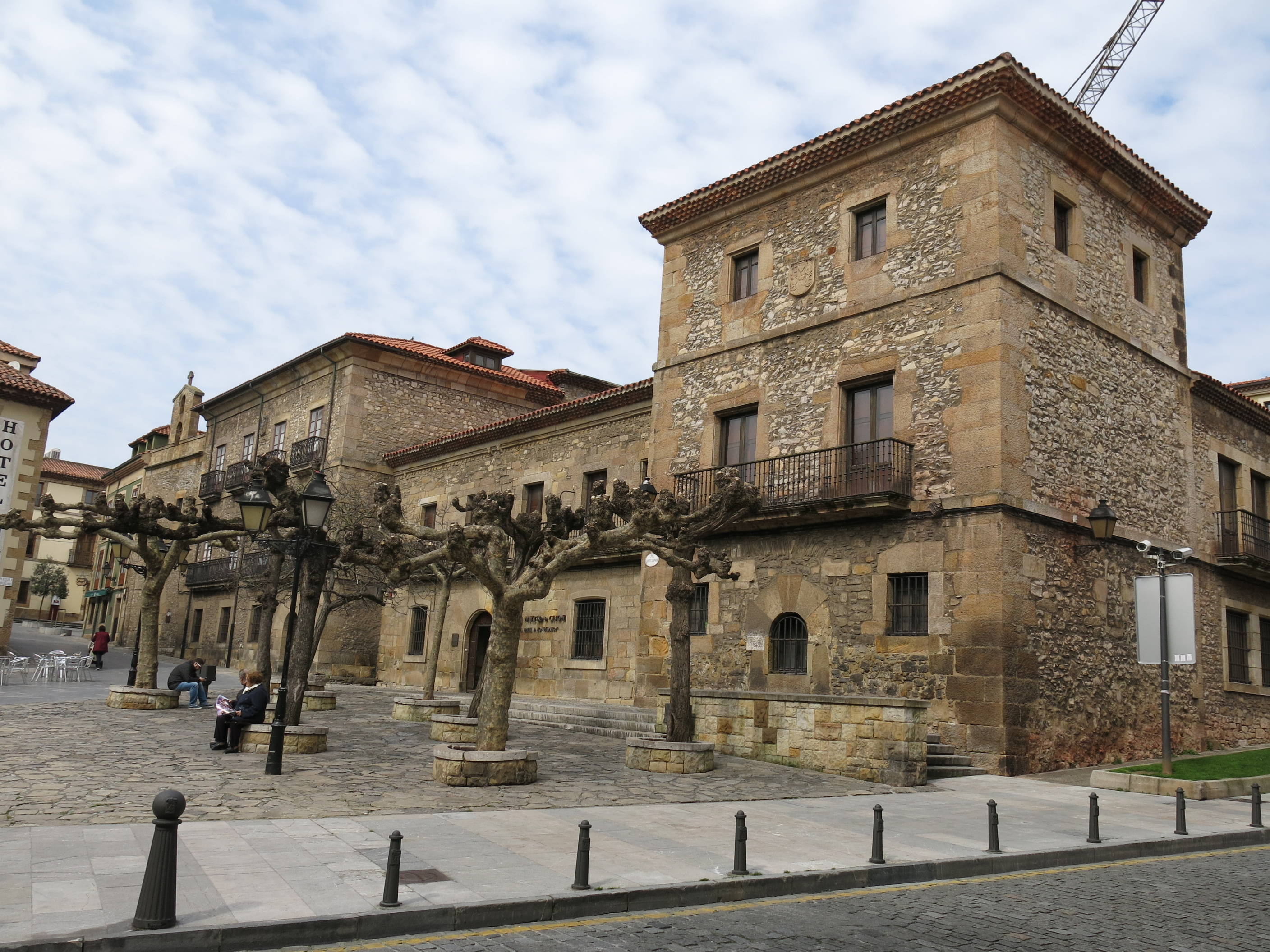 Casa Natal de Jovellanos (Casa Museo de Jovellanos)